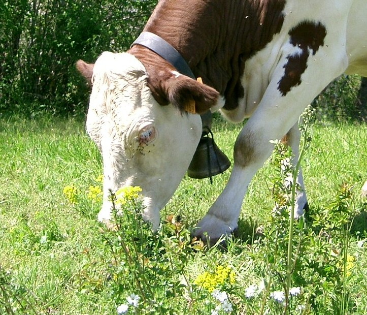 vache jurassienne